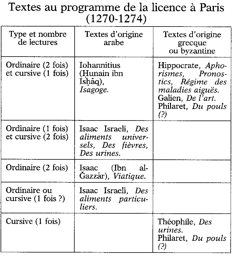 Textes au programme de al licence à Paris (1270-1274)